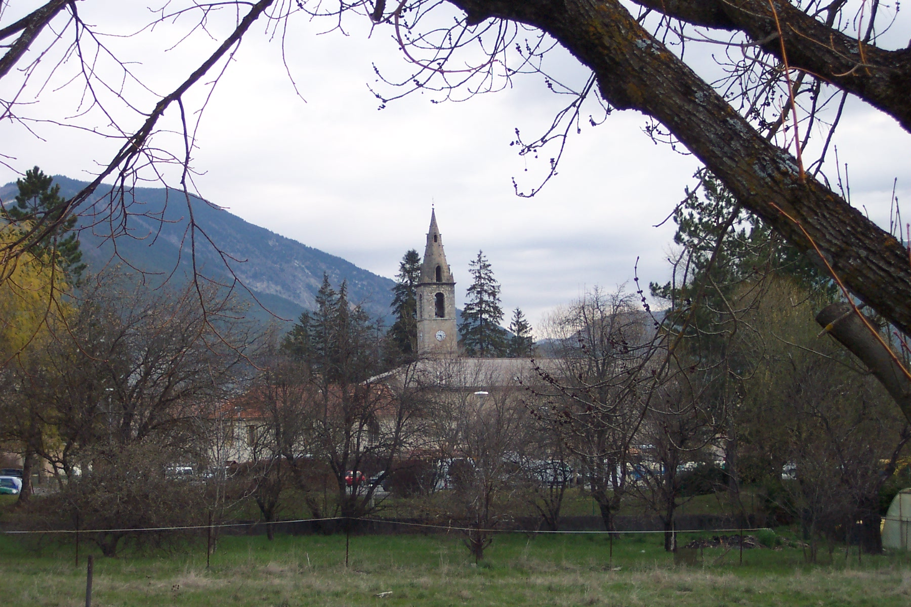 clocher de l'église de Saint-André-des-Alpes